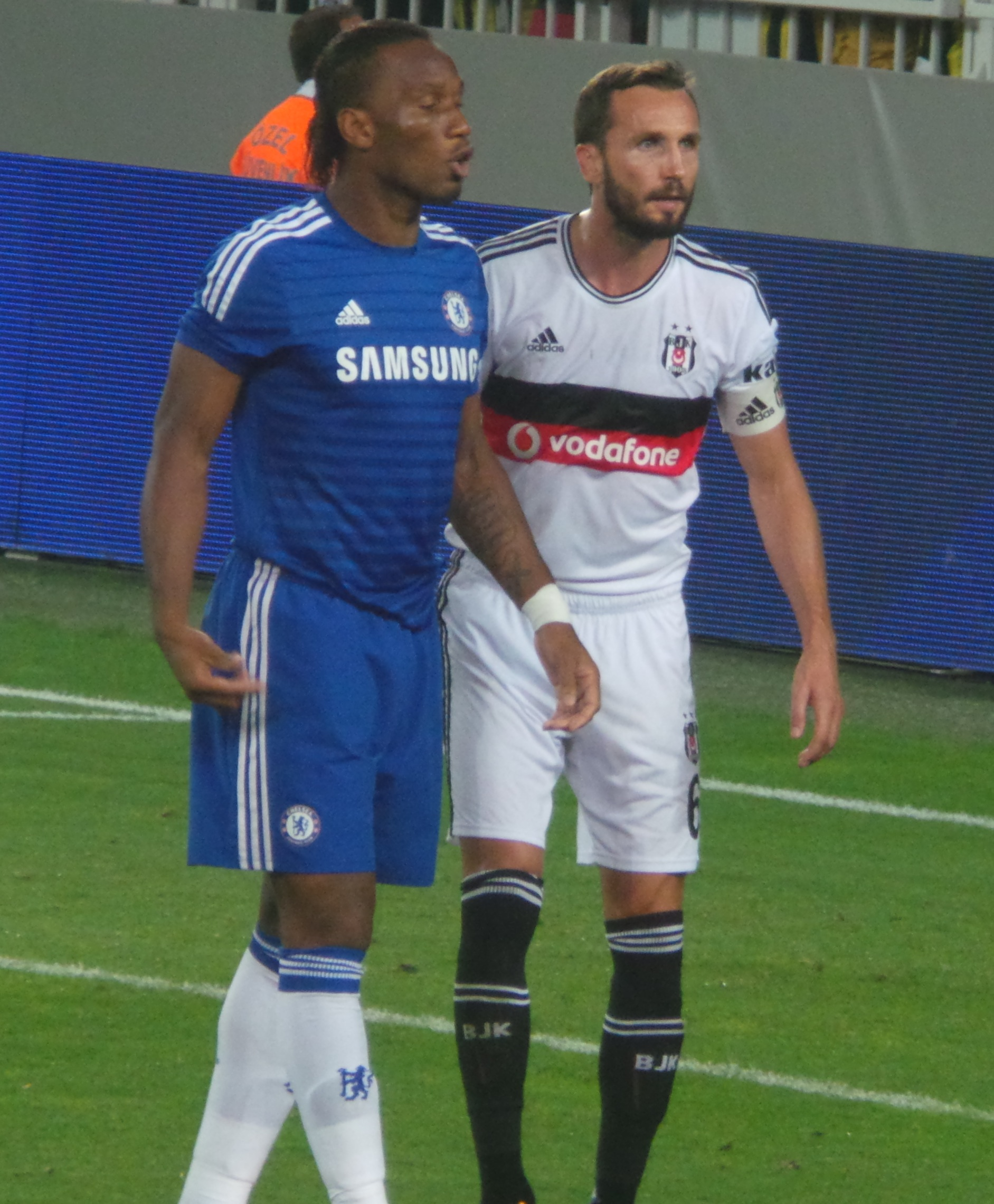 Sivok & Drogba SOMA Turnuvasında